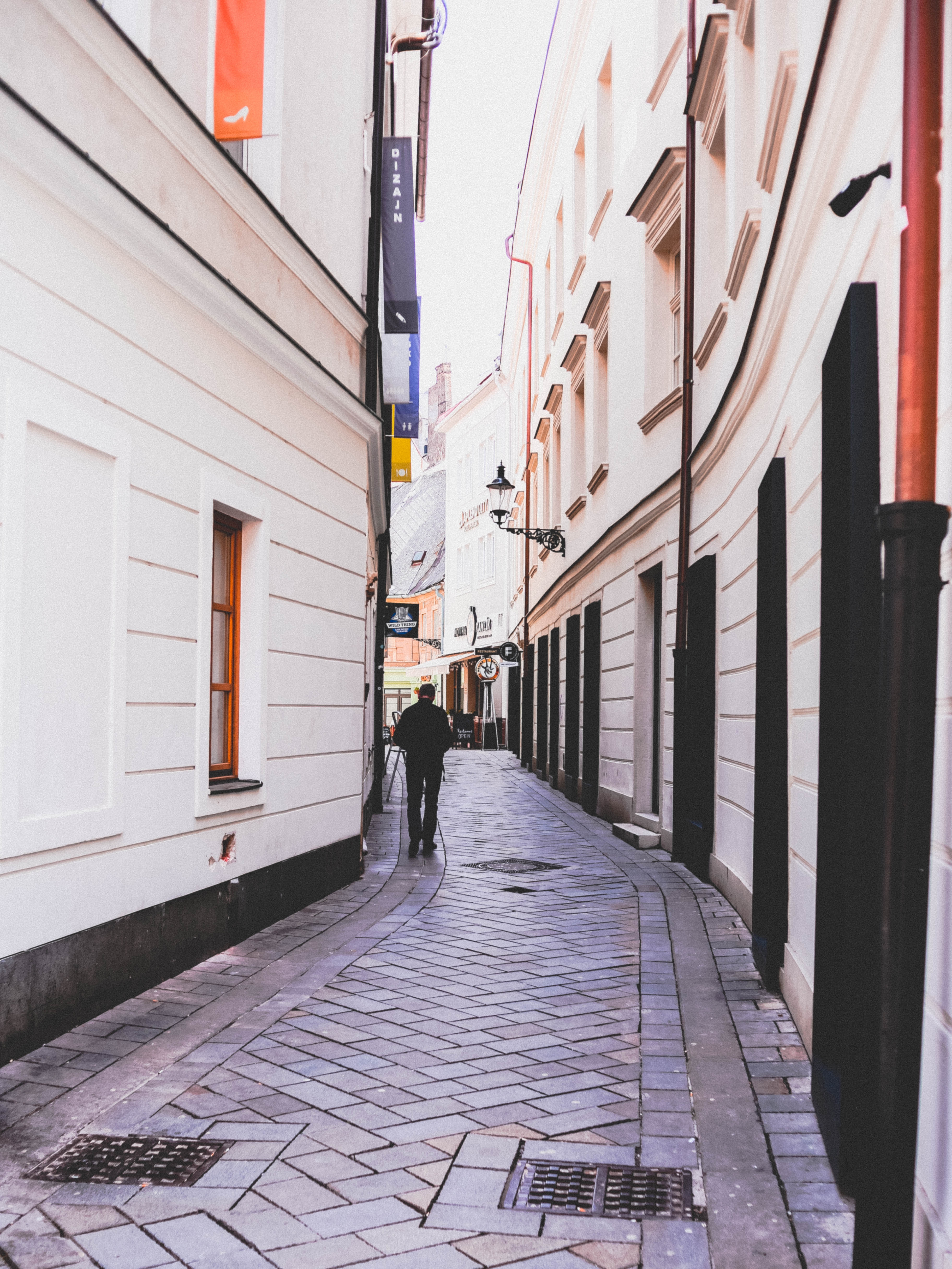 bhi